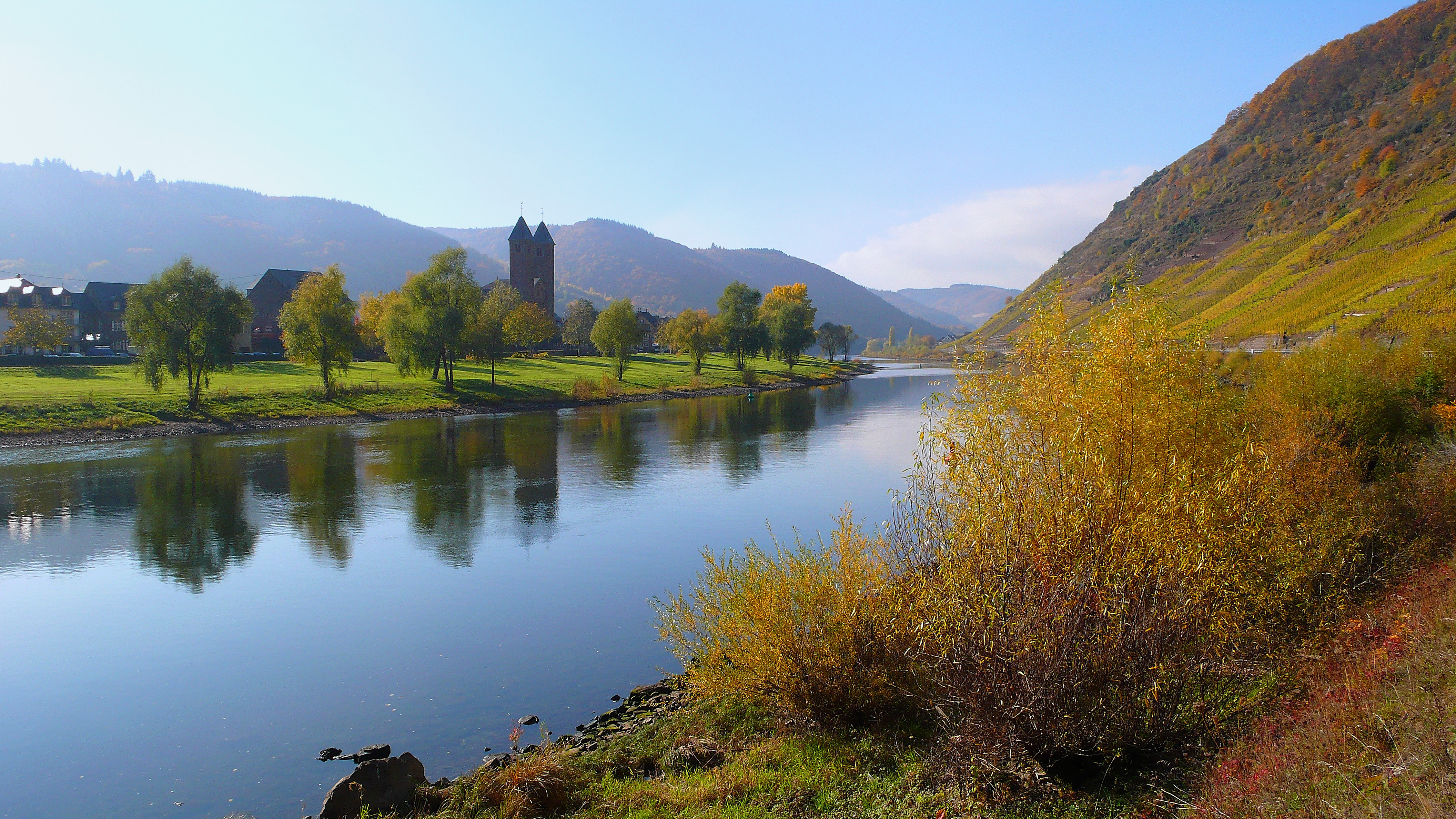 Blick auf Ernst von der gegenüberliegenden rechten Flussseite der Mosel